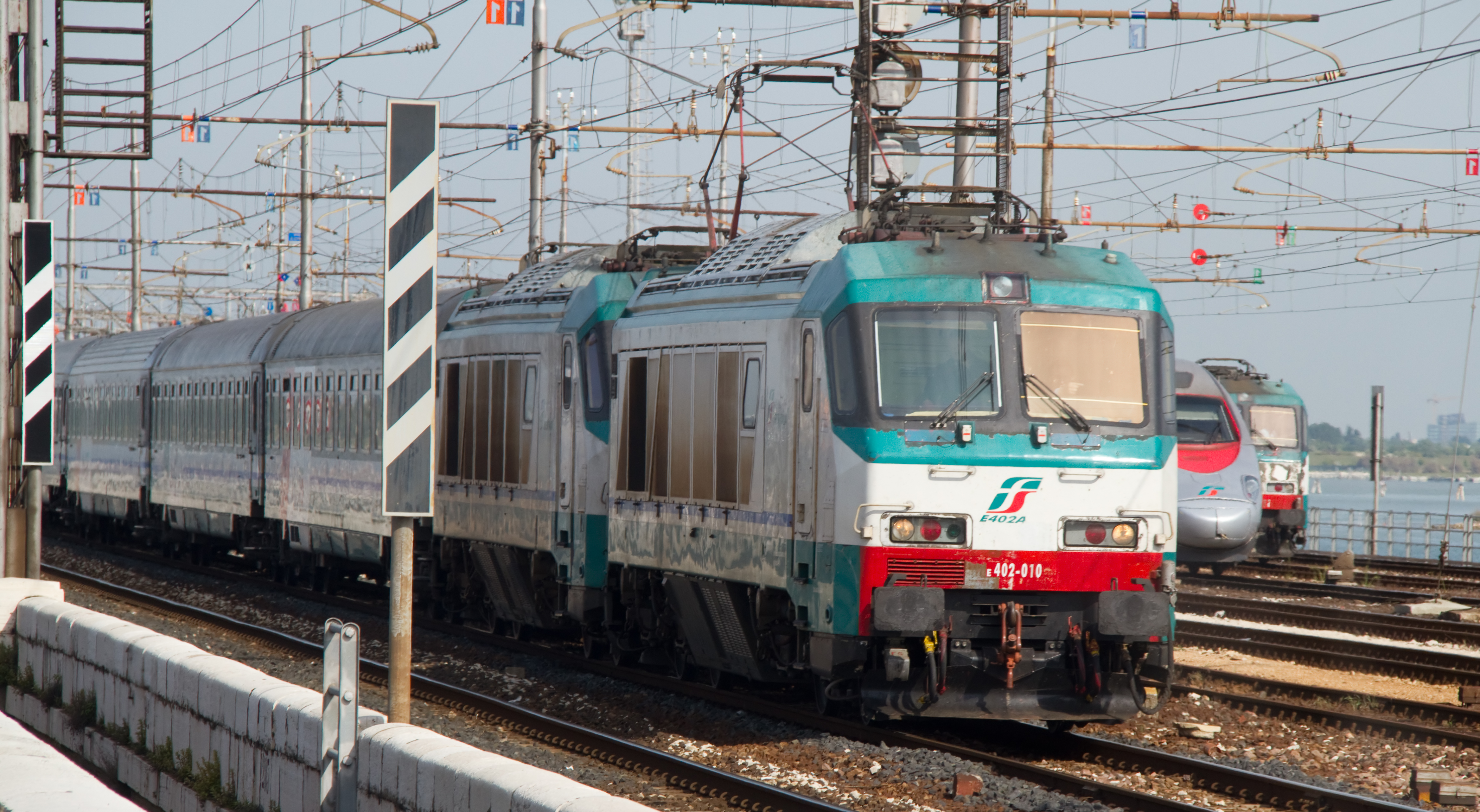 Venice Loco 402-010